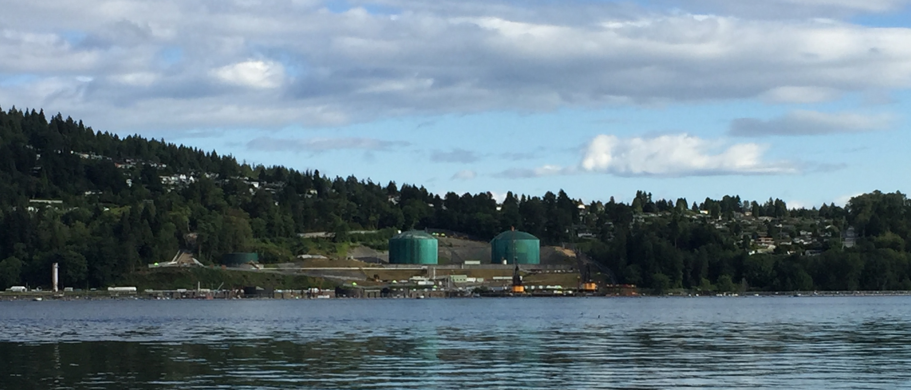 Le terminal est situé sur la rive gauche de la baie de Burrard.